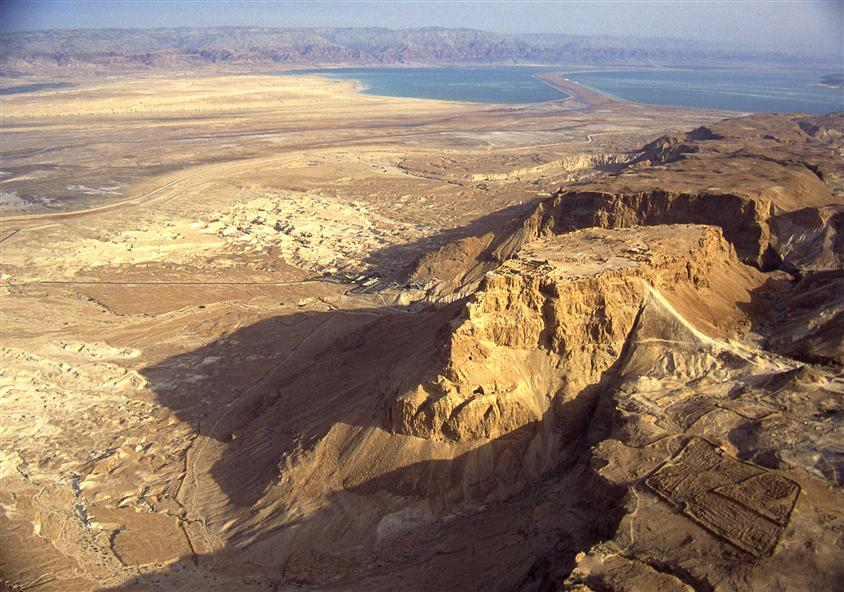 Masada